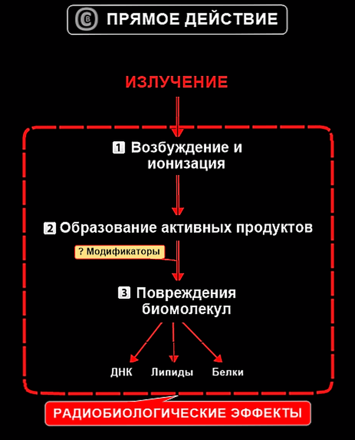 1.Физическая стадия. Перено­с энергии излучения. 2.Физико-химическая стадия. Перераспределение избыточной энергии между возбужденными молекулами. 3.Химическая стадия. Взаимодействие активных продуктов друг с другом и с окружающими молекулами.